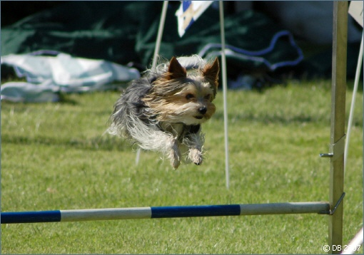 Biewer Agility Sprung, Sport mit einem Kleinrassehund